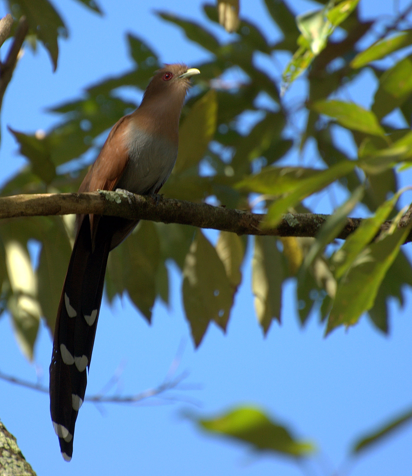 The Squirrel Cuckoo, Piaya cayana Horto Florestal de São Paulo